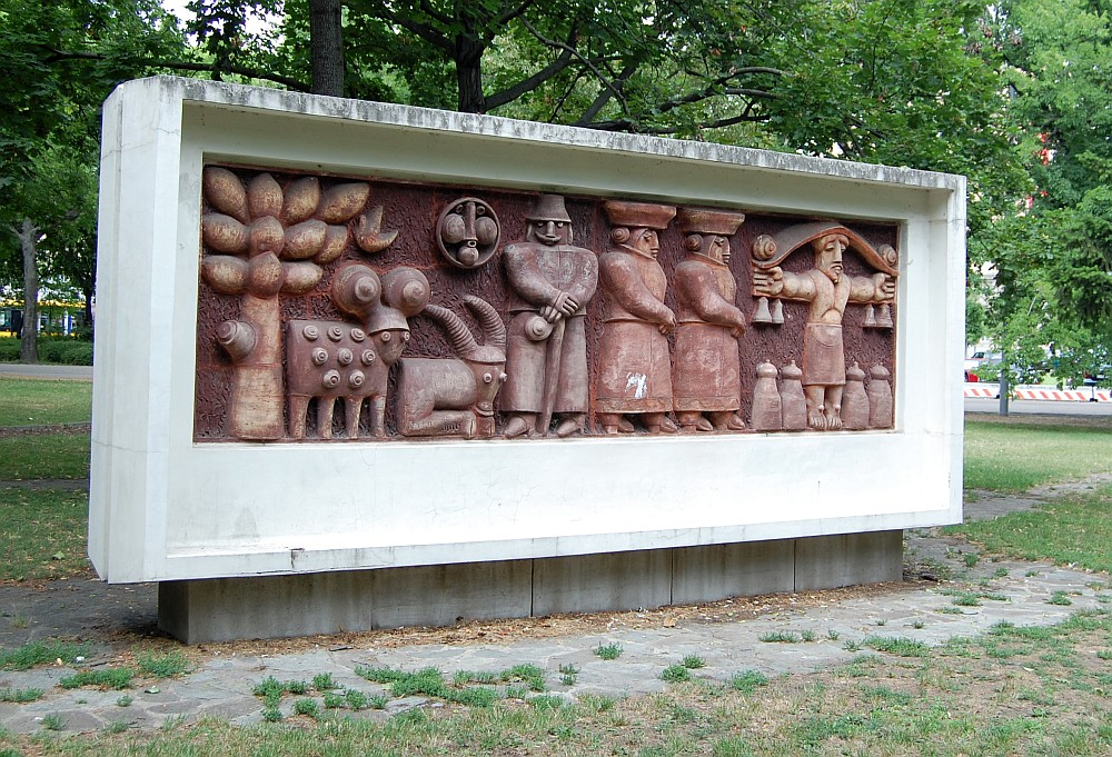 Göcsej-dombormű a Népligetben. Centenáriumi Park (1973).